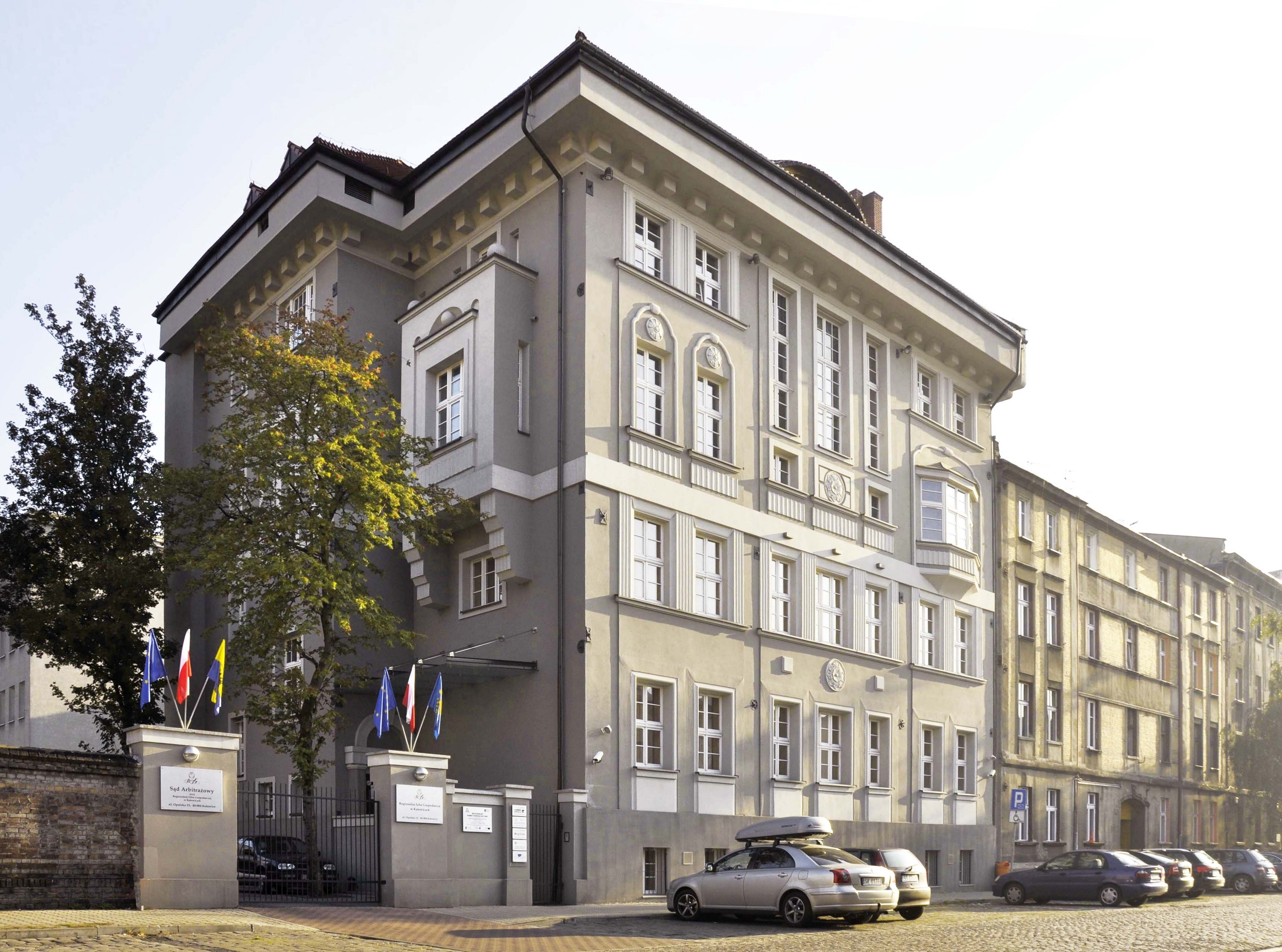 Regionalna Izba Gospodarcza w Katowicach